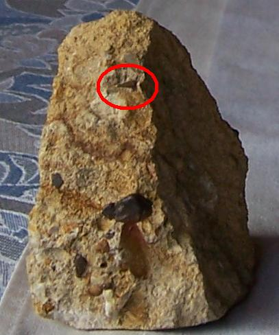 Haizahn und charakteristische Gerölleinschlüsse in den Weiner Schichten/Burgsteinfurtformation/erdgesch. Zeitalter: Santon ca. 87 Mio Jahre alt.